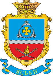 Герб села Яськи, Біляївський район, Одеська область